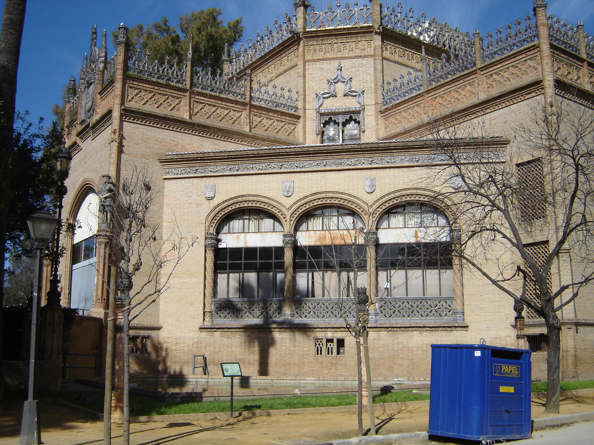 Pabellón Real (Plaza de América). Parque de María Luisa (Sevilla).